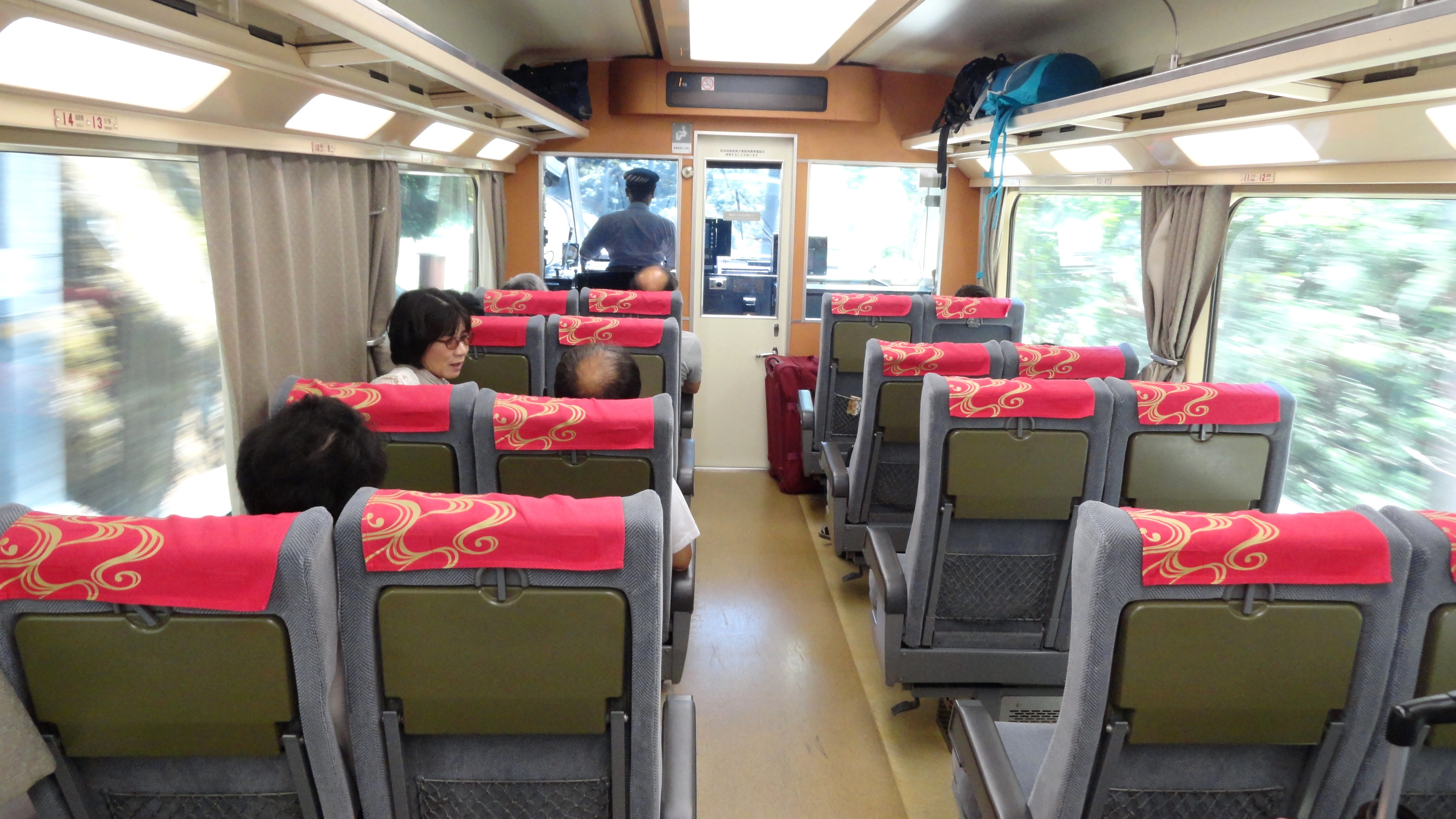 Limited Express from Namba Osaka Station to Gokurakubashi, Nankai Koya Line